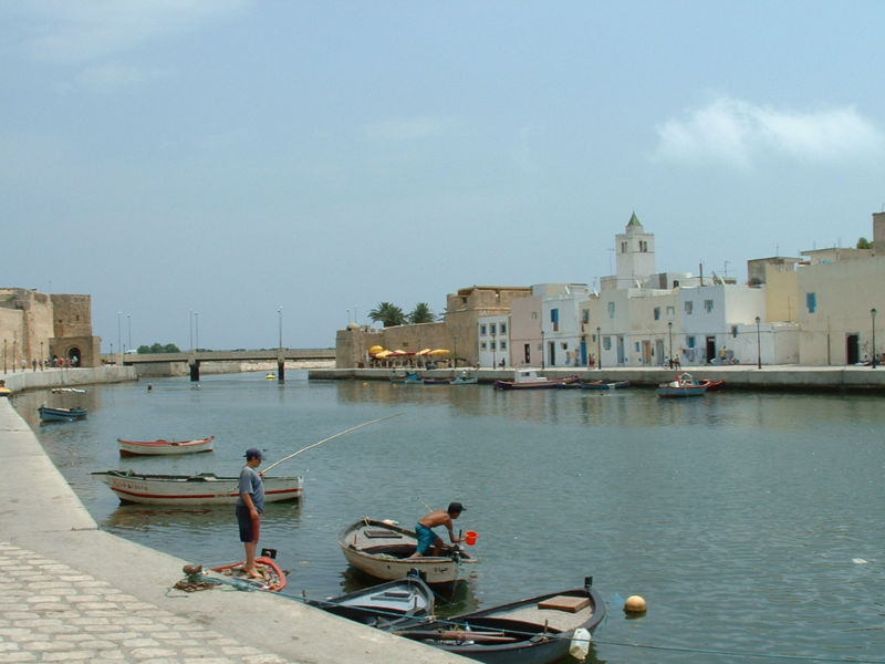 Photographie personnelle (Asram) prise à Bizerte (Tunisie). L'entrée du vieux port est gardée par la kasbah, dont on voit l'entrée à gauche, et la ksiba, petit fortin d'origine byzantine